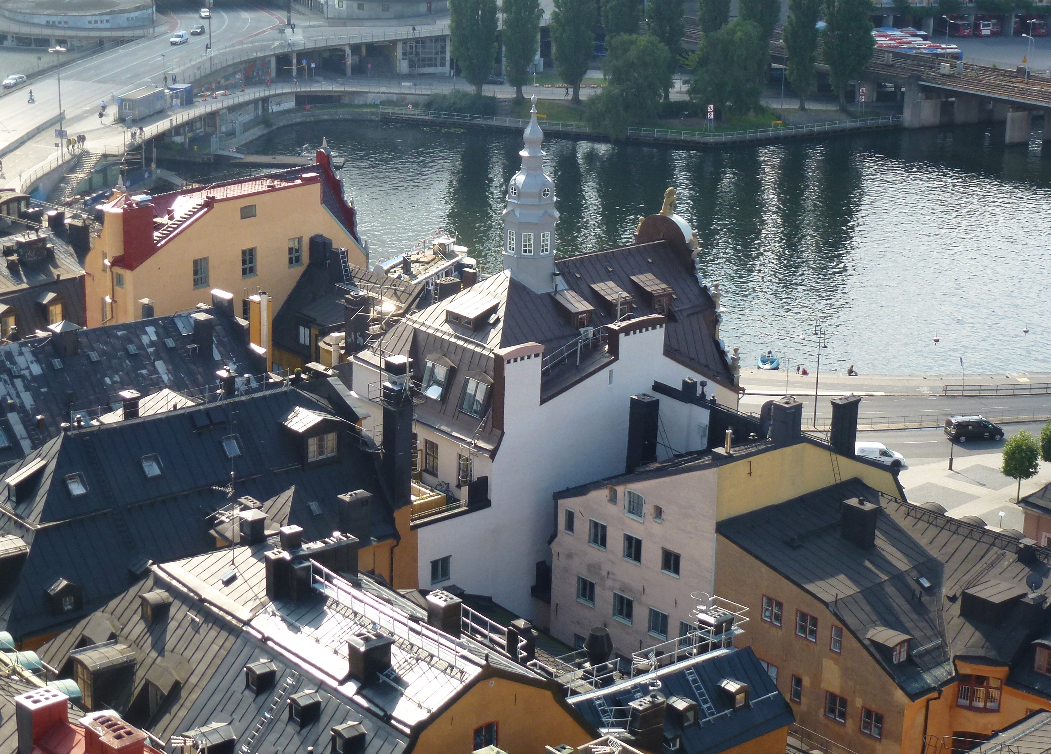 Modehuset 66an (huset med tornet), vy från Tyrka kyrkan